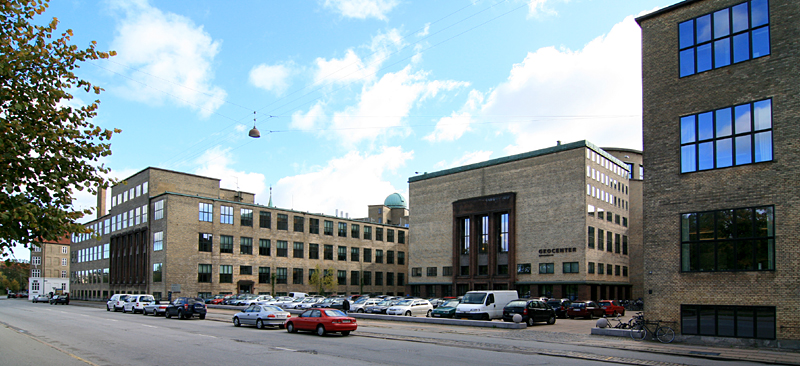 Geocenter, Københavns Universitet. Øster Voldgade.